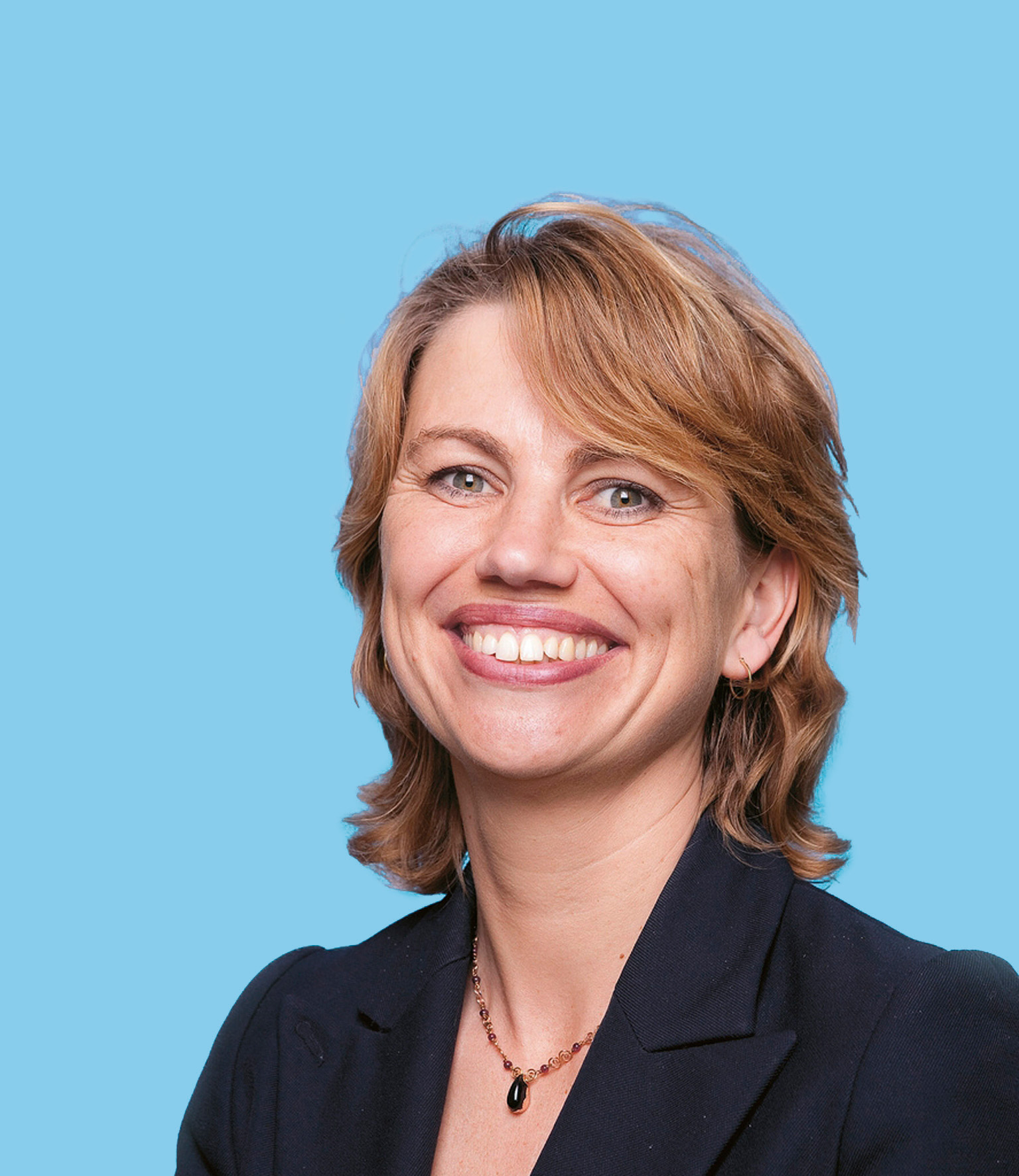 Roos Vermeij, Tweede Kamerlid.